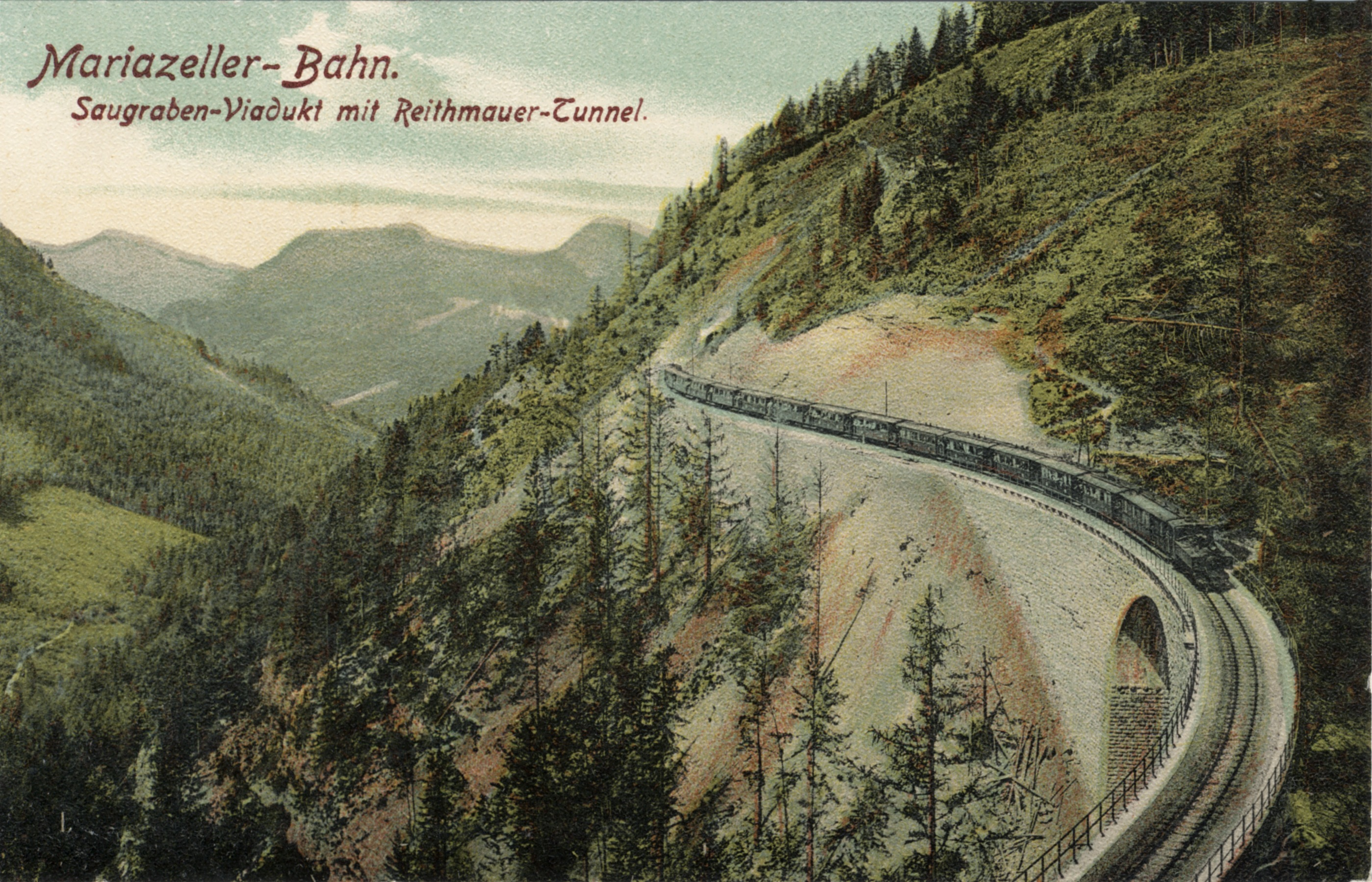 Personenzug der Mariazellerbahn auf dem Saugrabenviadukt bei Annaberg, gezogen von einer Lokomotive der Reihe Uv.